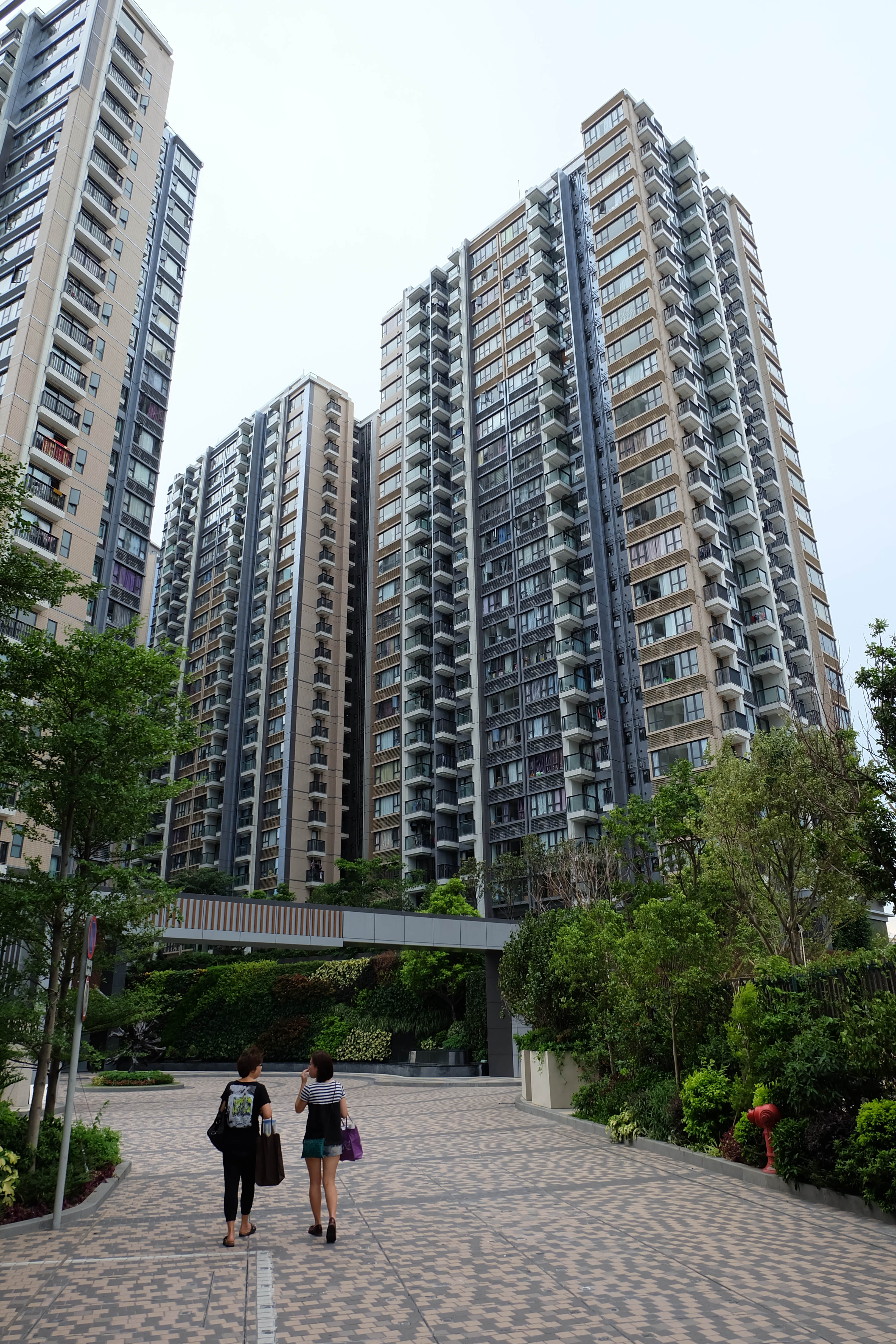 中文（香港）: 溱柏屋苑內部